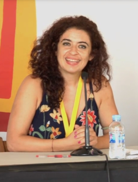 Escola d'estiu CUP 2017 - Geopolítica de la Mediterrània. Presenta: Arnau Carné (Ítaca). Amb: Leila Nachawati, Ramon Grosfoguel i Carles Riera.